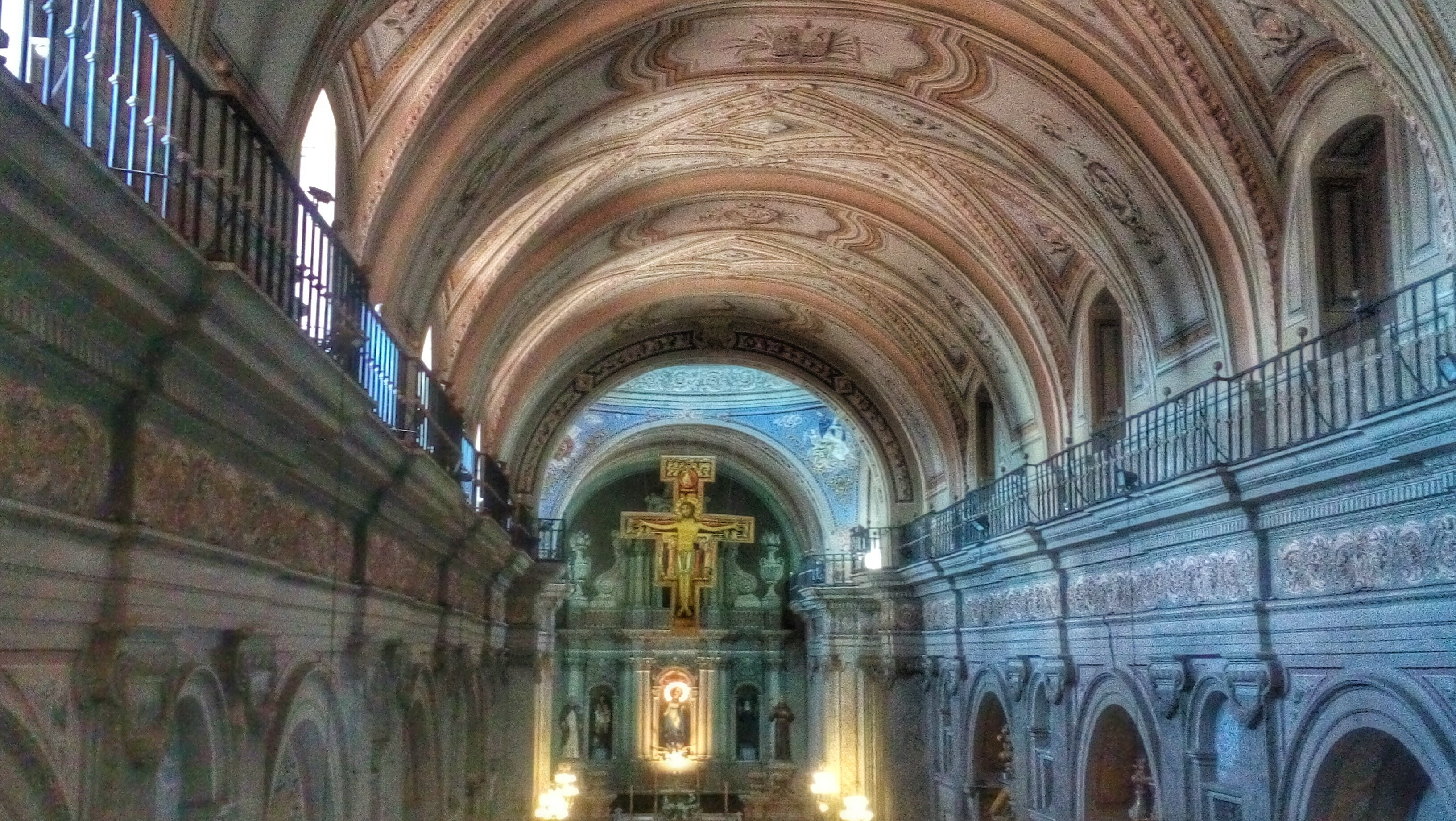 Basilica Menor y Convento de San Francisco Salta